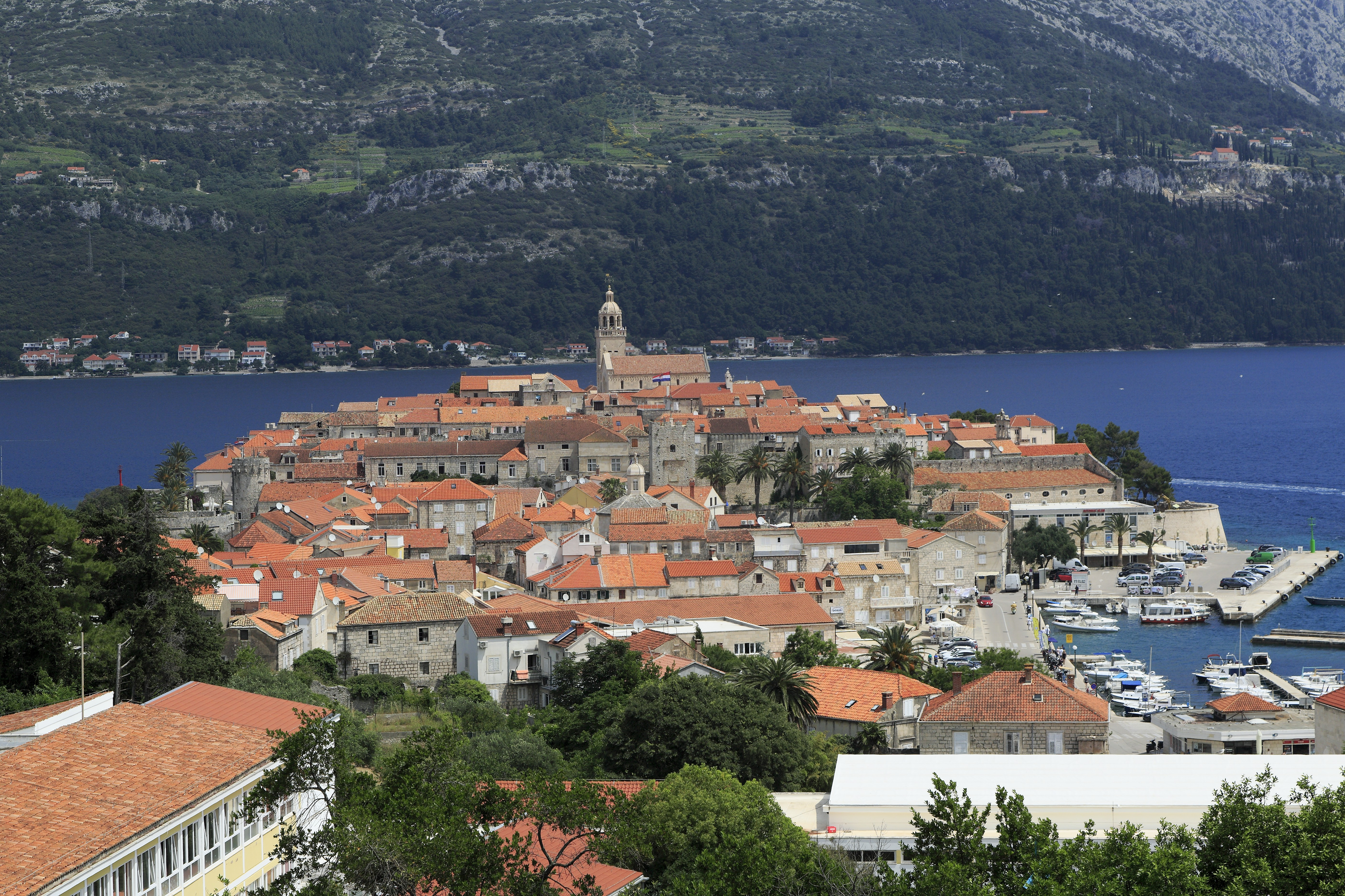 …mit Pelješki kanal und Pelješac im Hintergrund